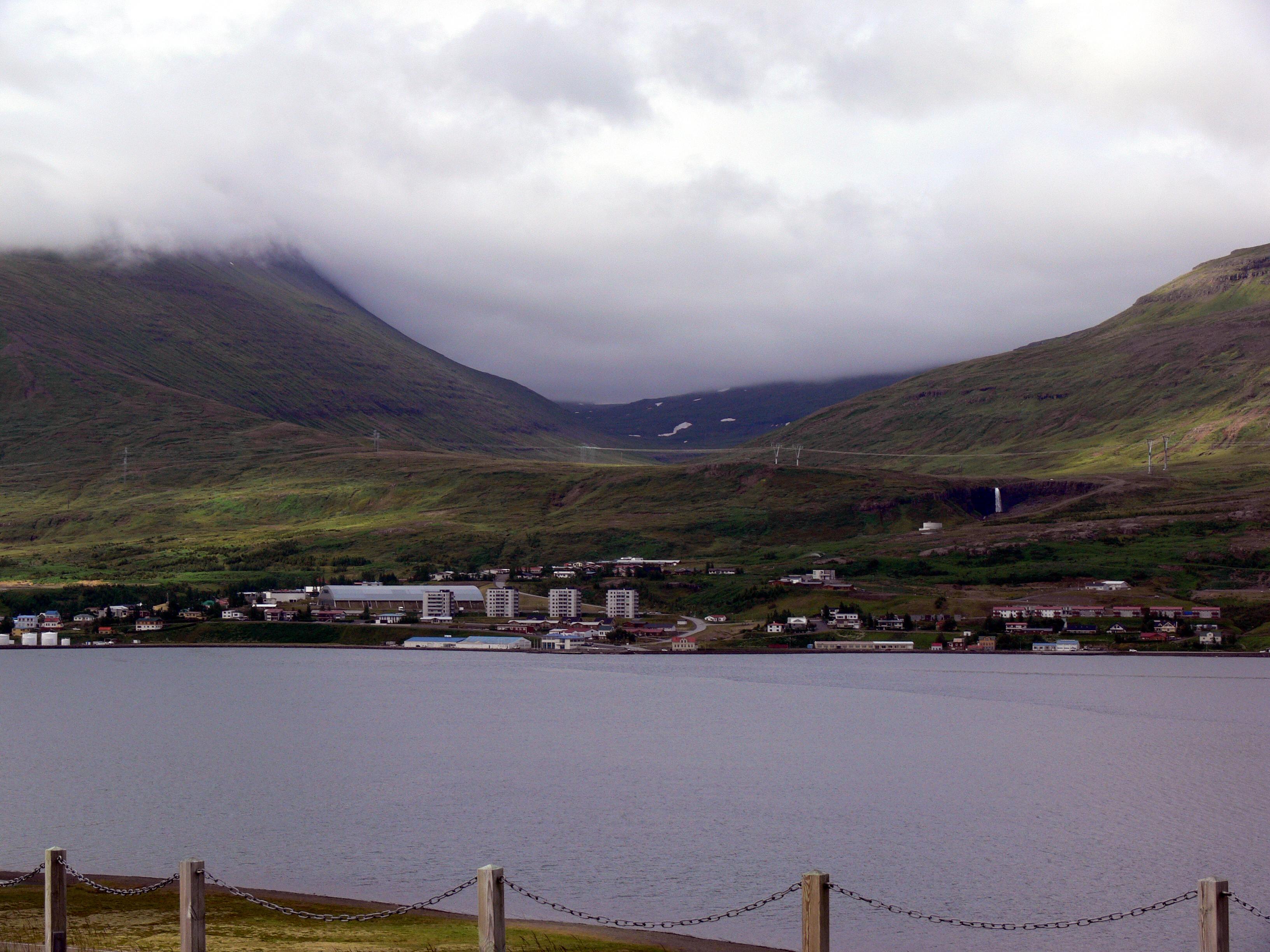 Reiðarfjörður.